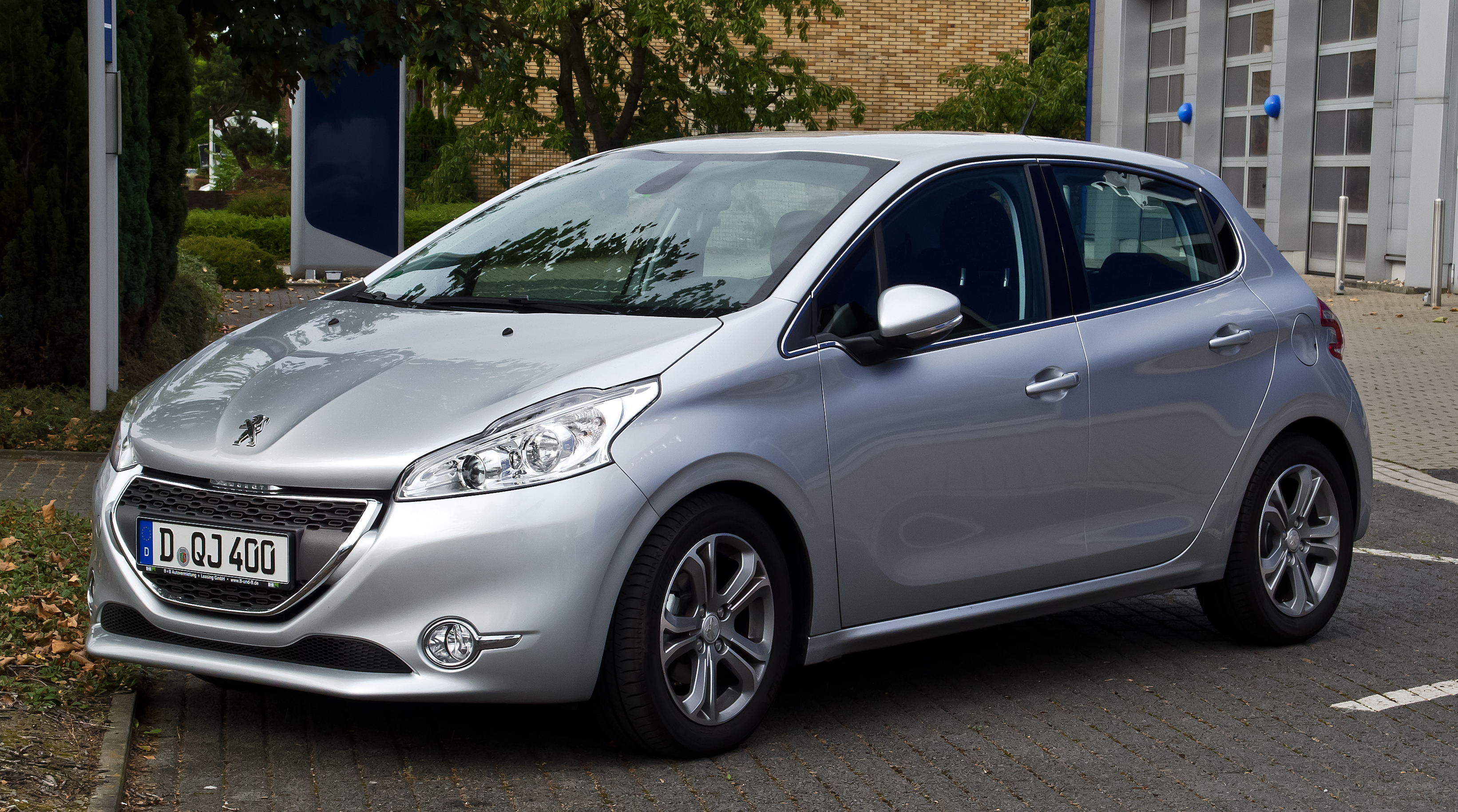 Peugeot 208 e-HDi FAP 115 Stop & Start Allure